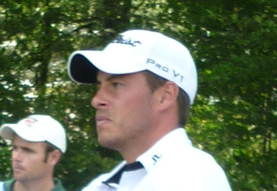 José-Filipe Lima op KLM Open 2010